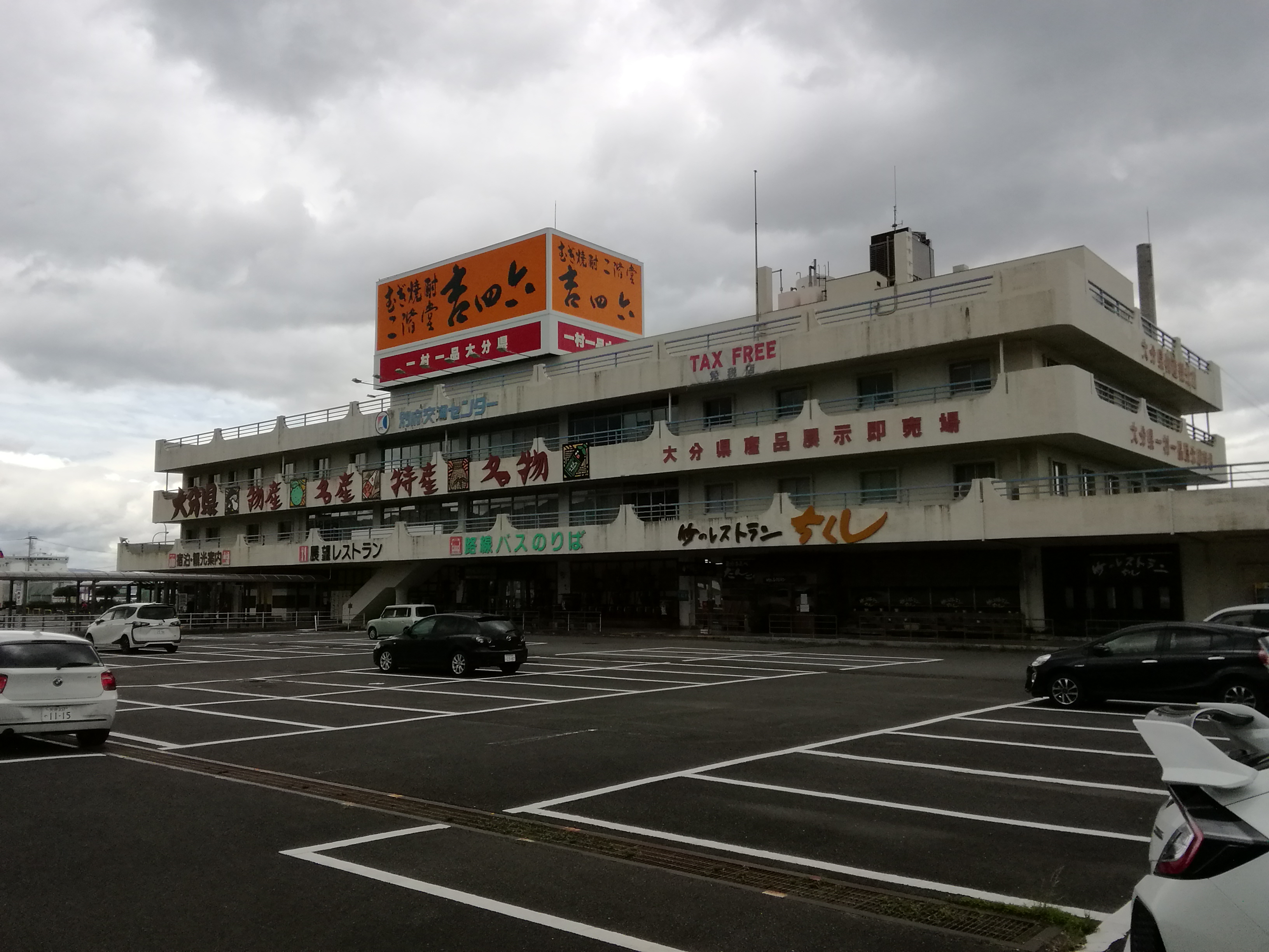 大分県別府市、別府交通センター